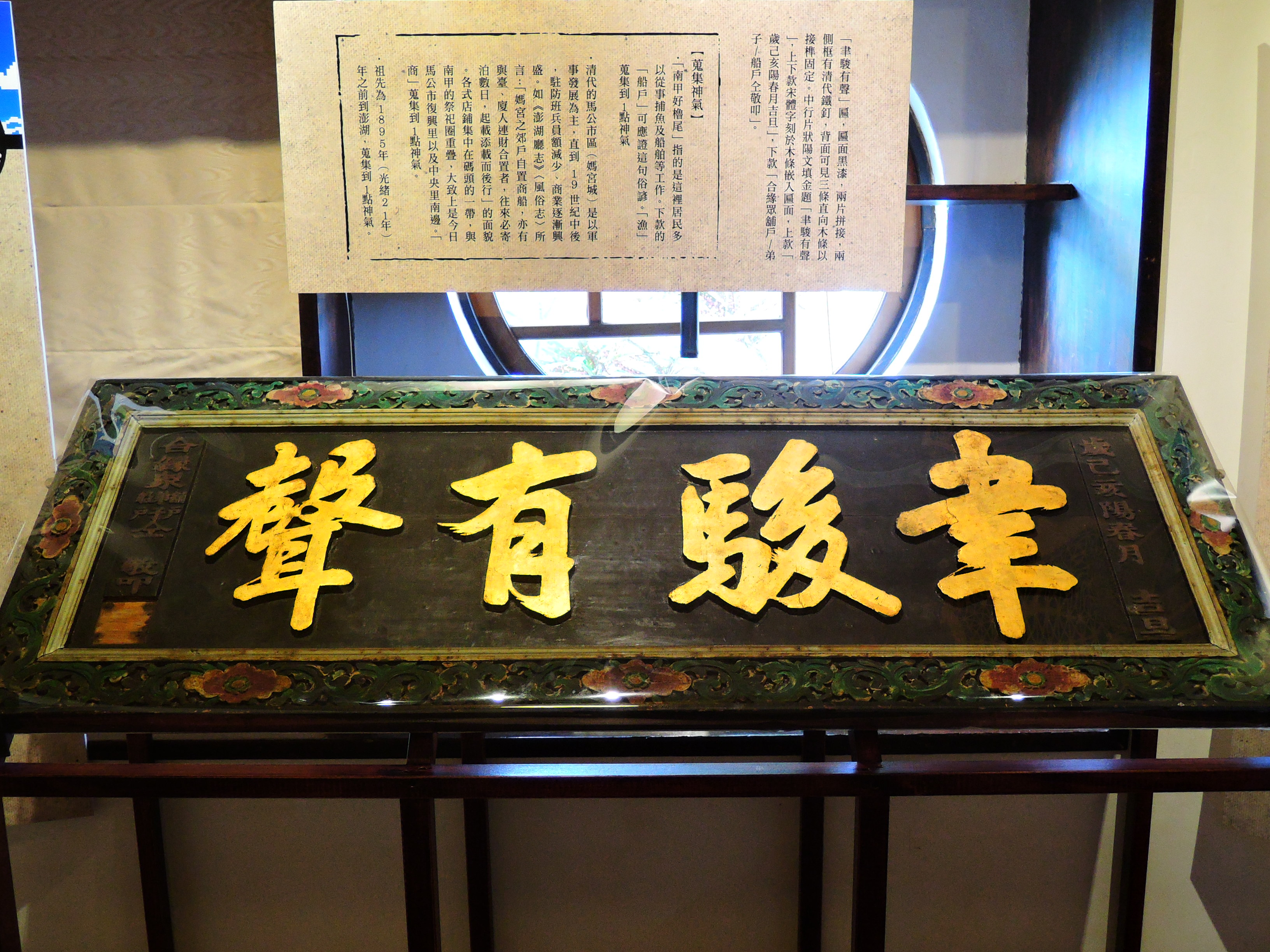 中文（台灣）: 聿駿有聲匾，光緒21年（1895）由合緣眾舖戶、船工仝敬獻。